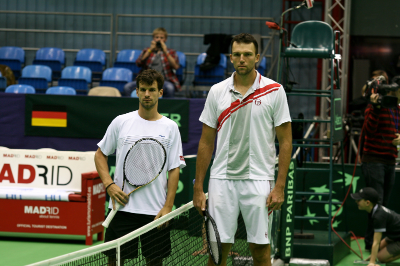 Davisov kup 2011. u Zagrebu